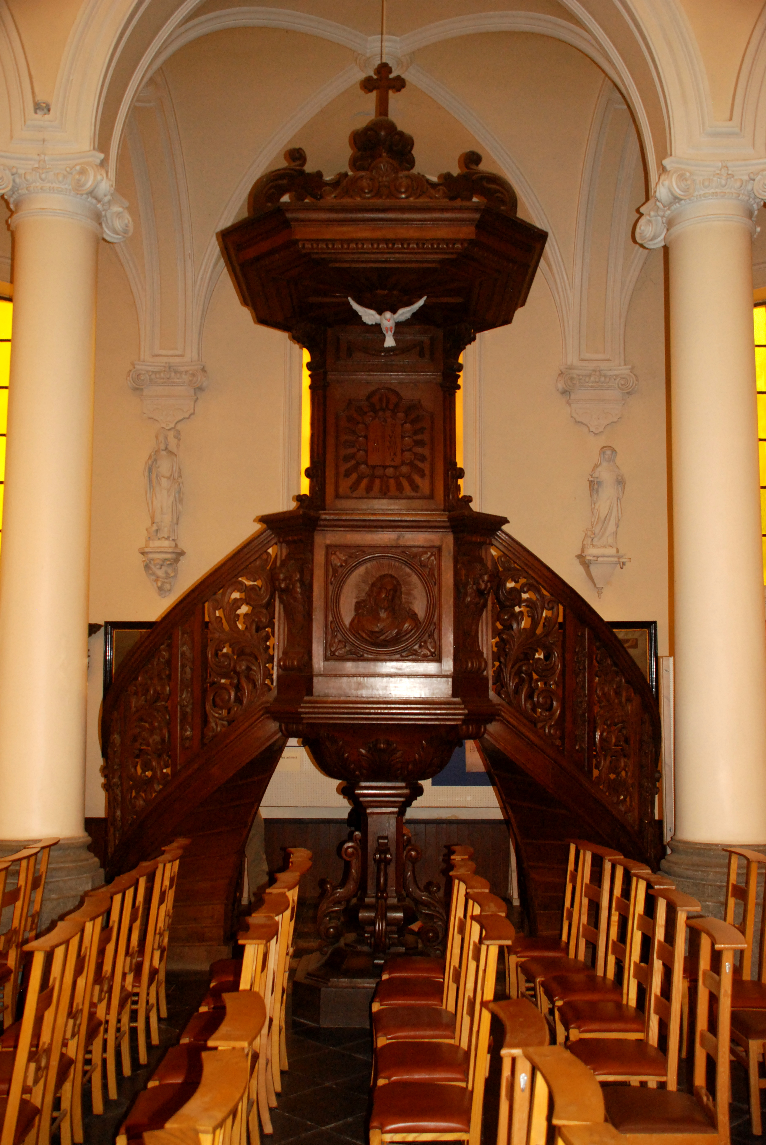 Belgique - Brabant wallon - Chastre - Église Sainte-Gertrude de Gentinnes